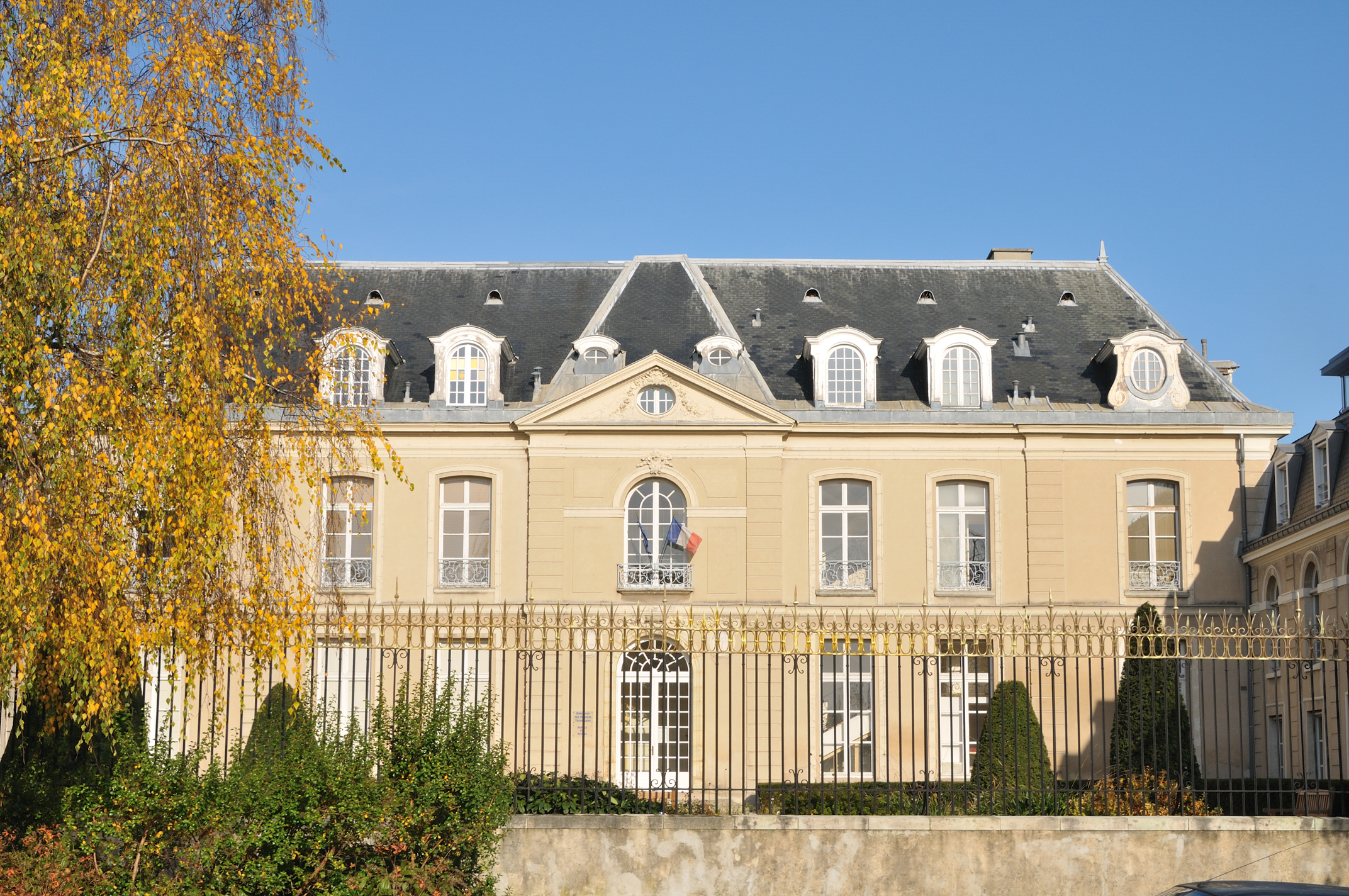 Ancien collège Sainte-Barbe-des-Champs, Fontenay-aux-Roses, Hauts-de-Seine, France